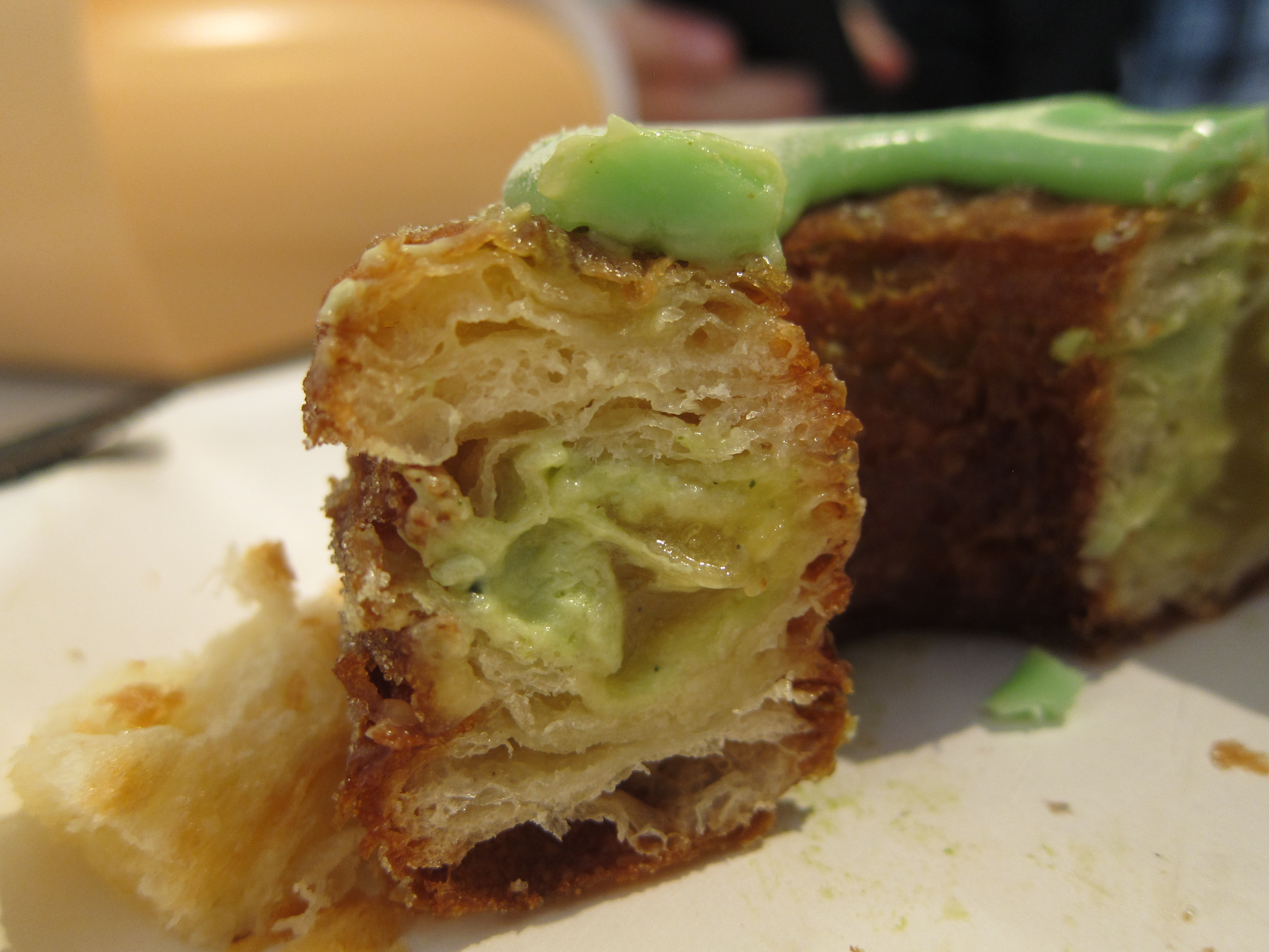 Dominique Ansel - Cronut Insides 2